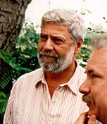 A házigazda Farkasházy Tivadar kalauzolja Horváth Balázst és Deutsch Tamást - Szárszói Találkozó 1994